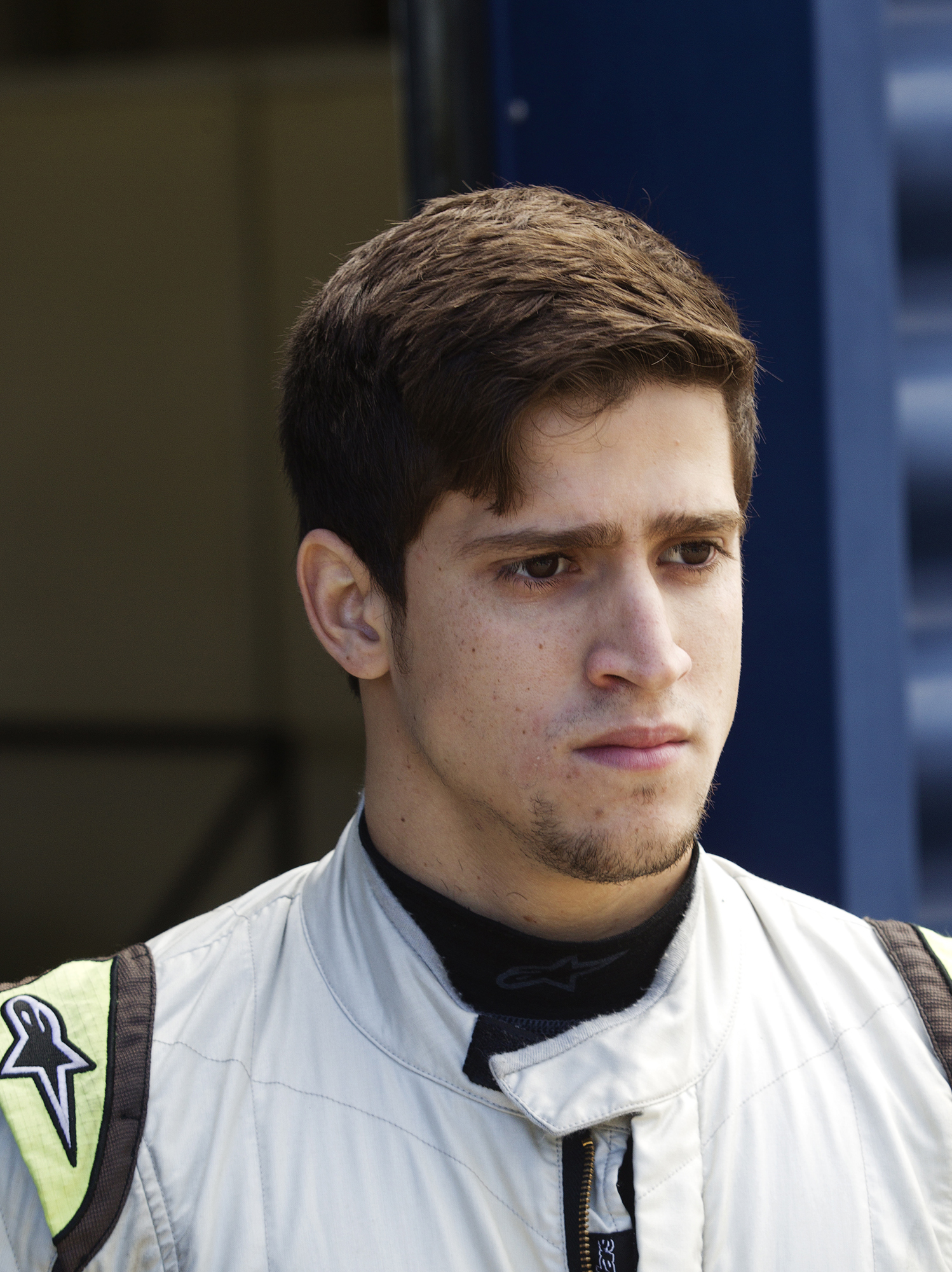 Piloto Henrique Baptista durante a etapa de Snetterton da Protyre Formula Renault BARC